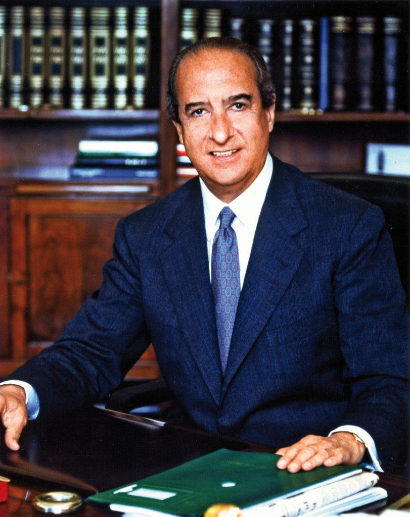 Le portrait d'Enrico Braggiotti